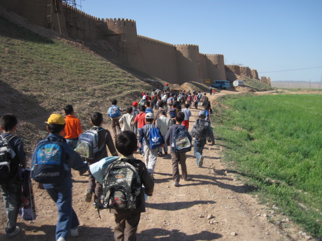 بازدید از شهر بلقیس اسفراین 1391